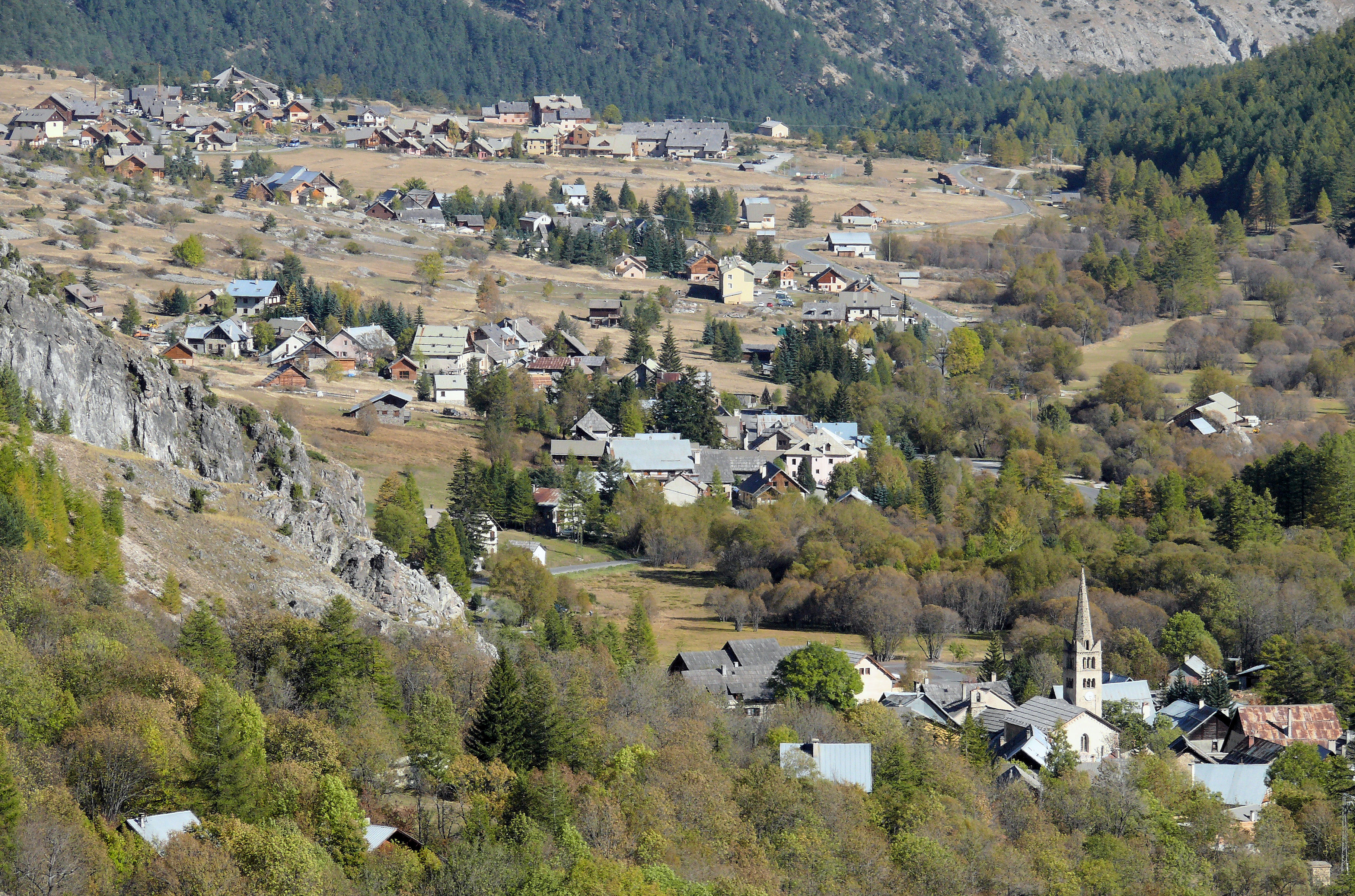 Névache - Ville haute et ville basse